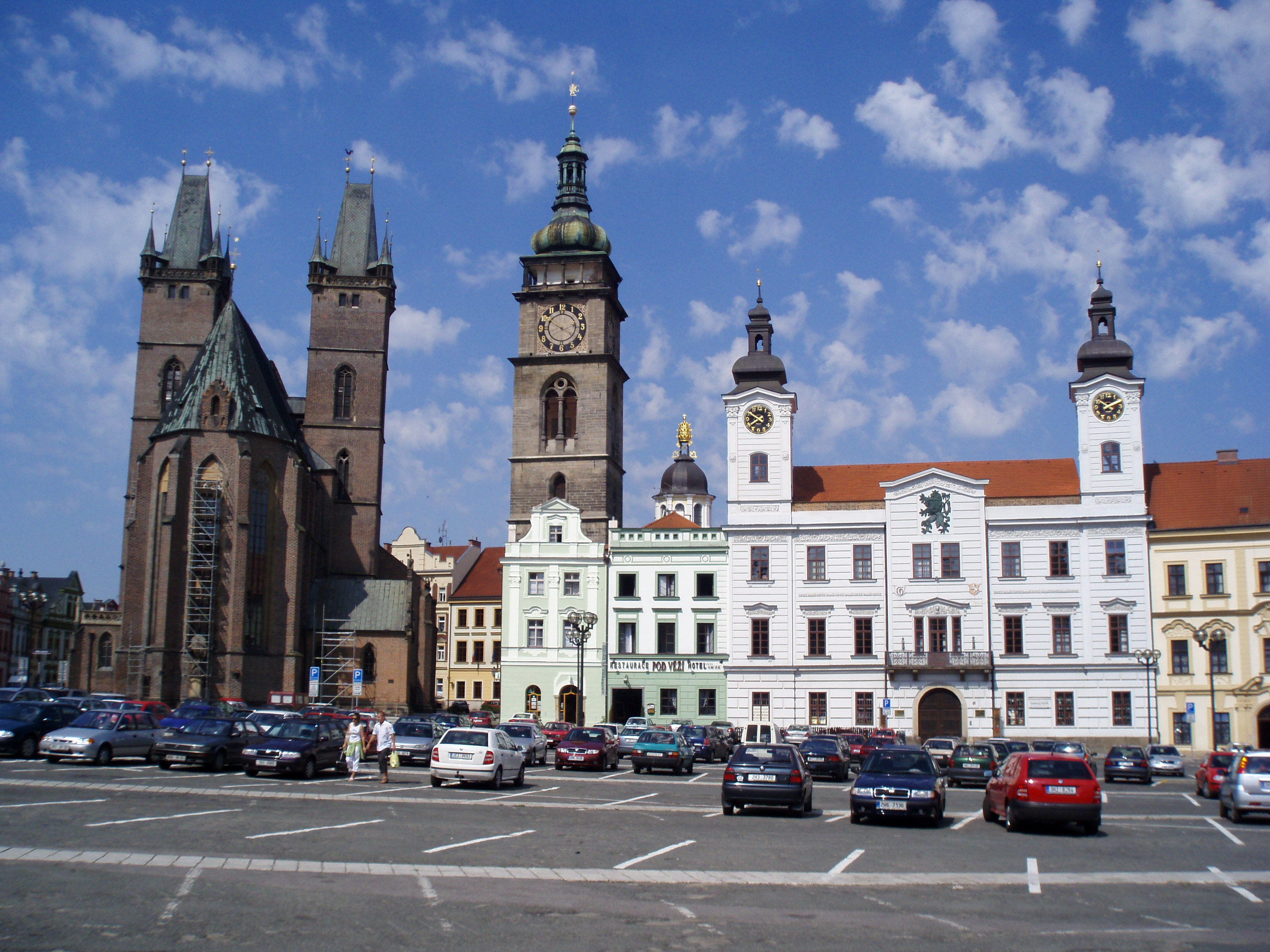 Pohled na královéhradecké dominanty